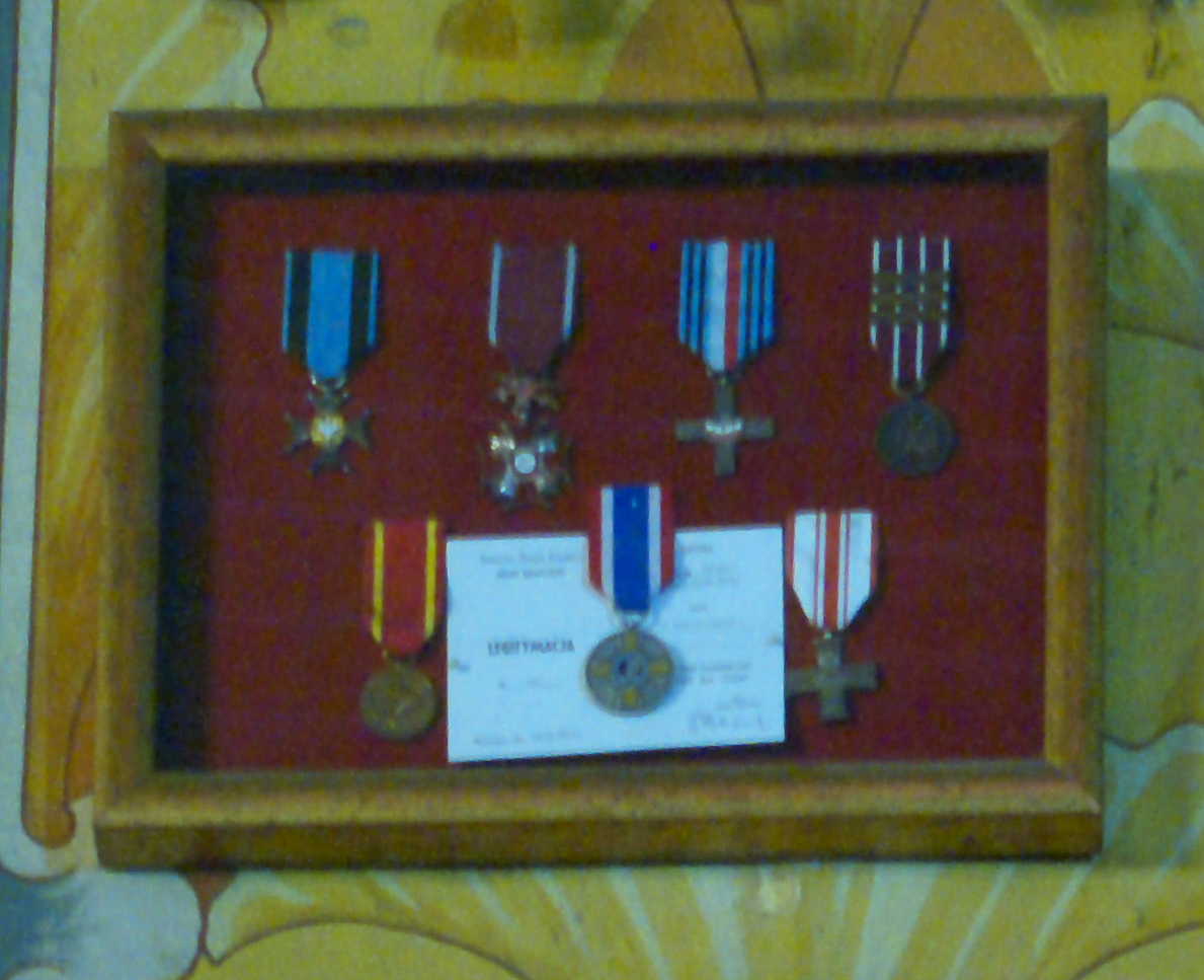 Gablotka z odznaczeniami rodzeństwa Danuty i Mieczysława Przystaszów w Kościele Przemienienia Pańskiego w Sanoku.